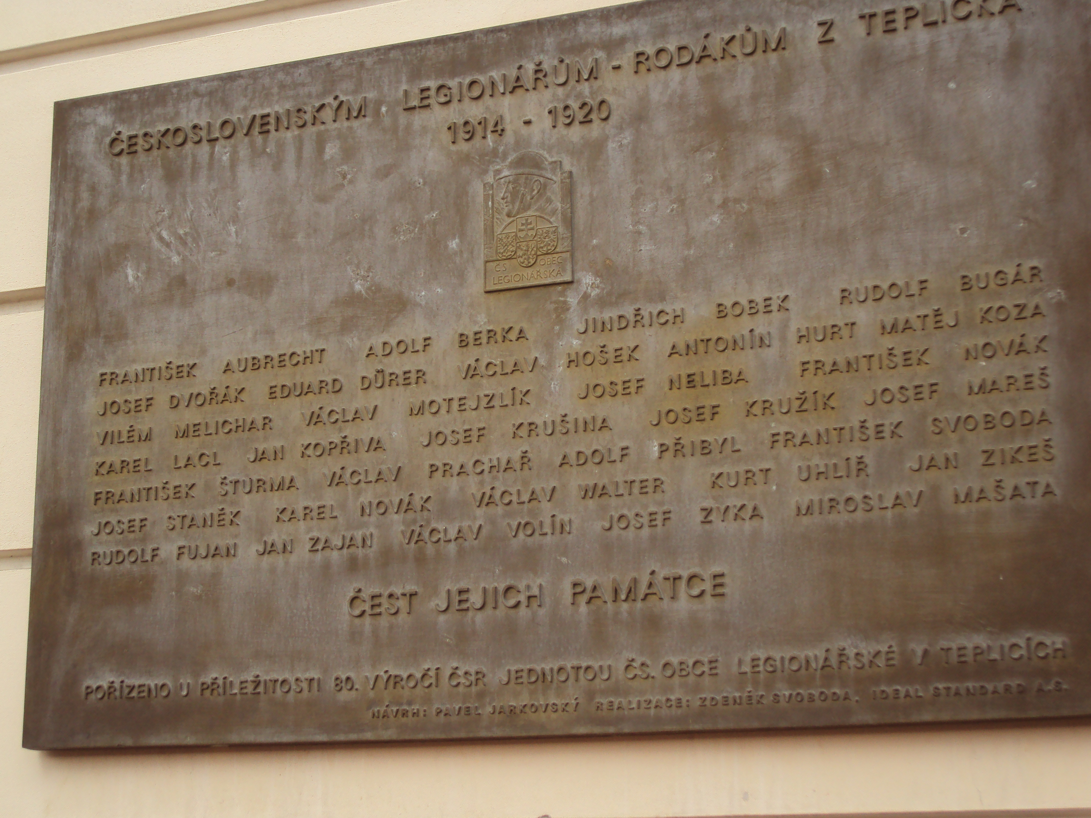 Deska na budově Vojenských lázní v Šanově